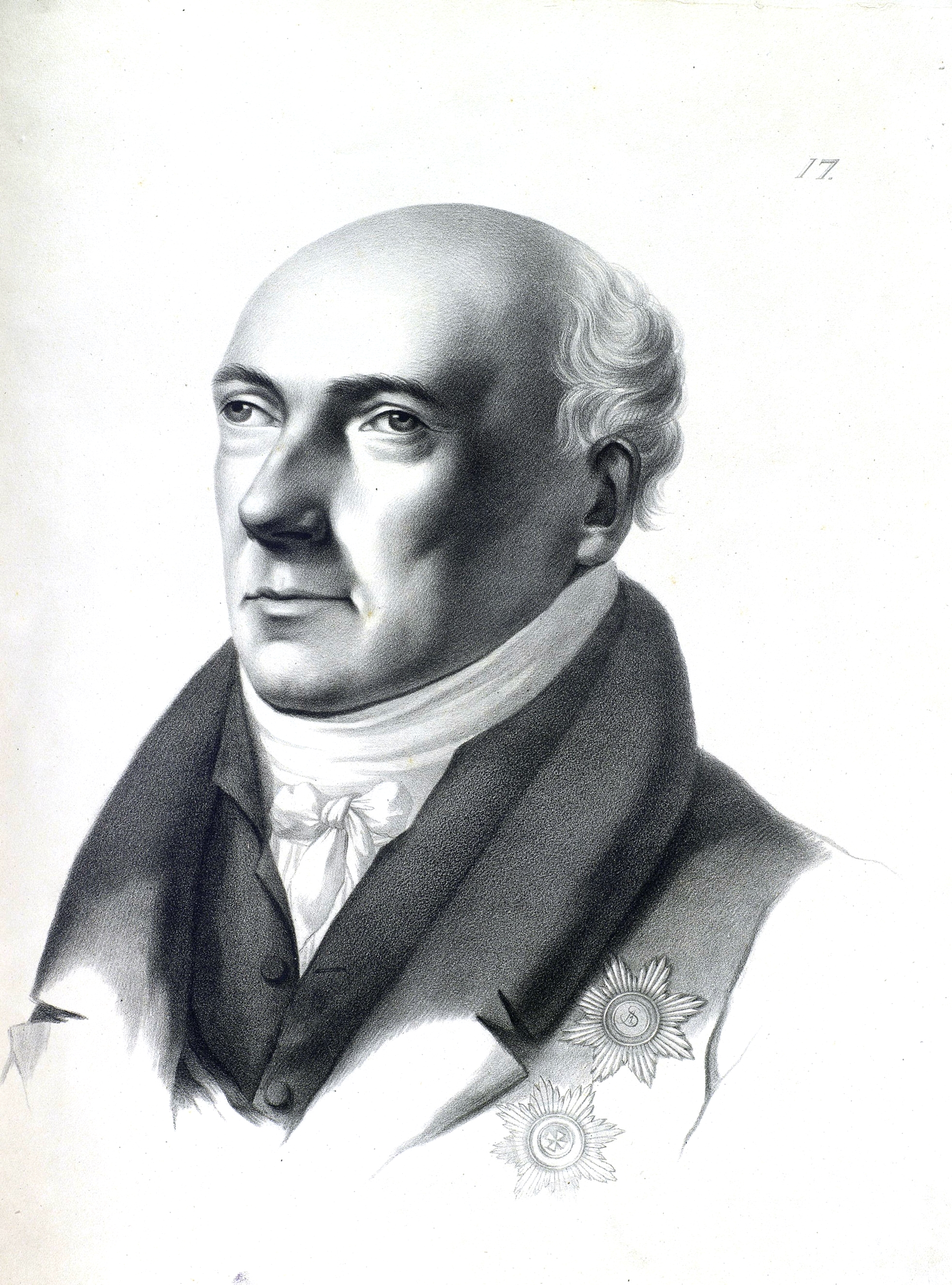 Дмитриев, Иван Иванович